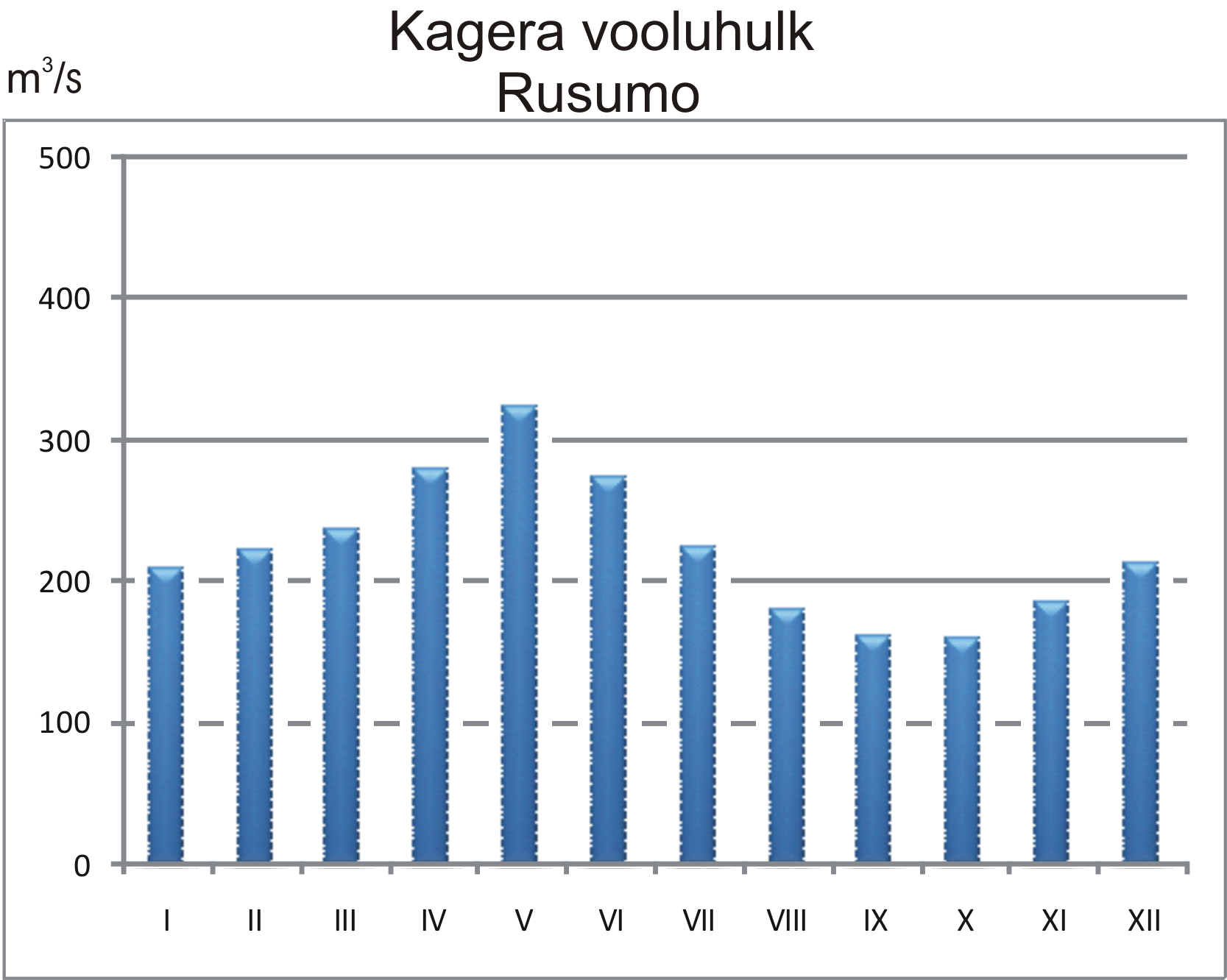 Kagera jõe hüdrograaf Rusumos